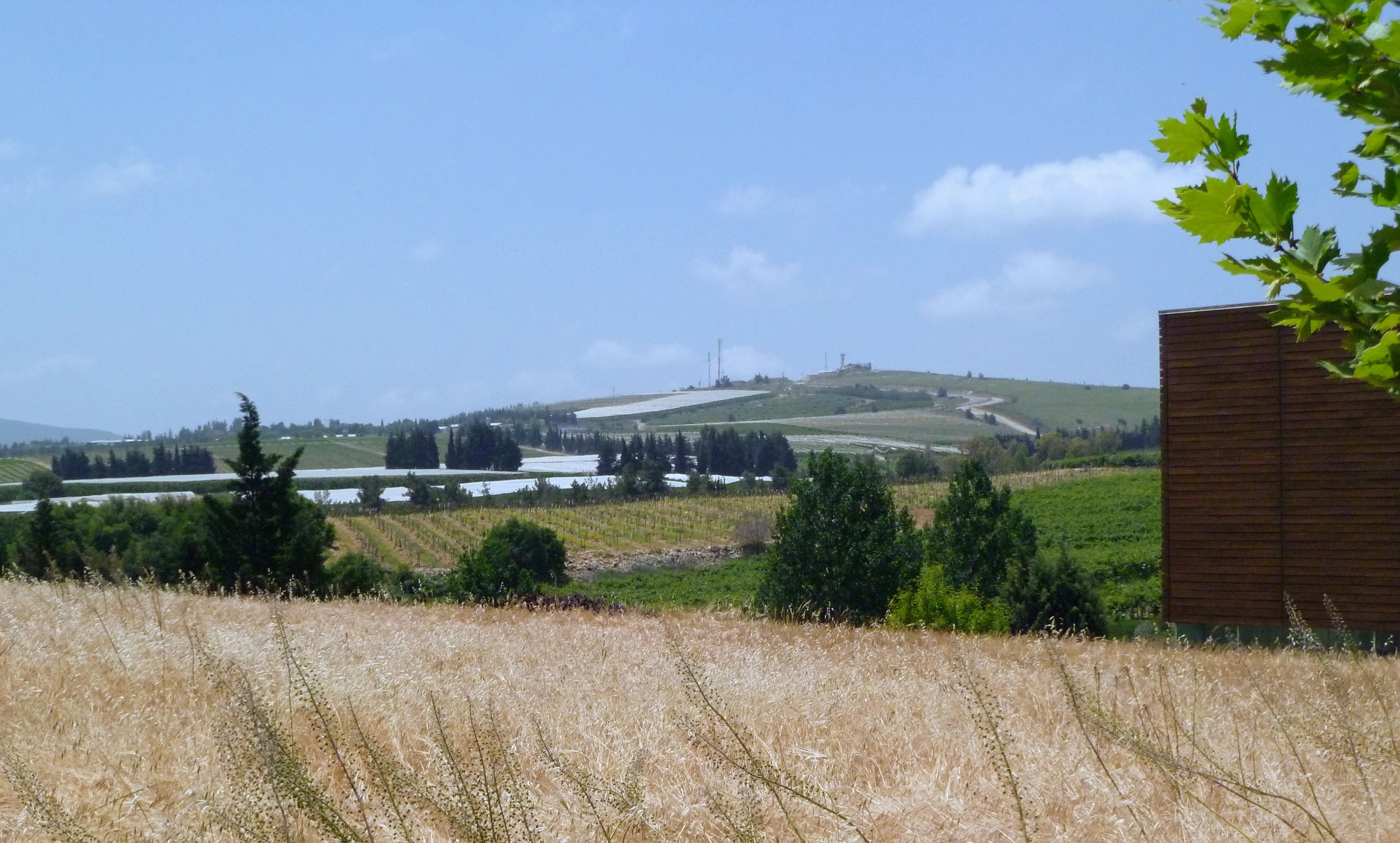 יקב הרי גליל מראה כללי מהכניסה